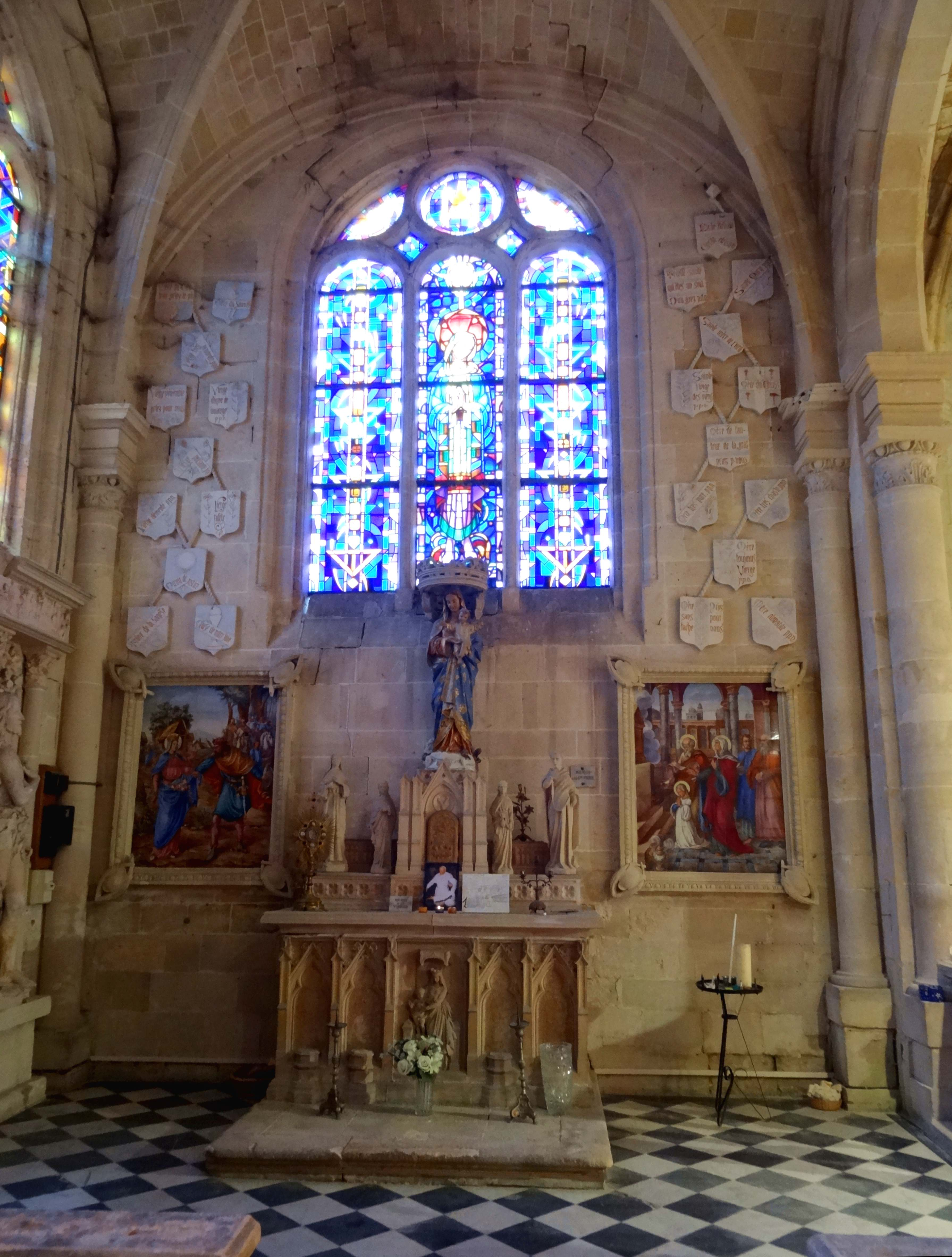 Intérieur de l'église - voir titre.